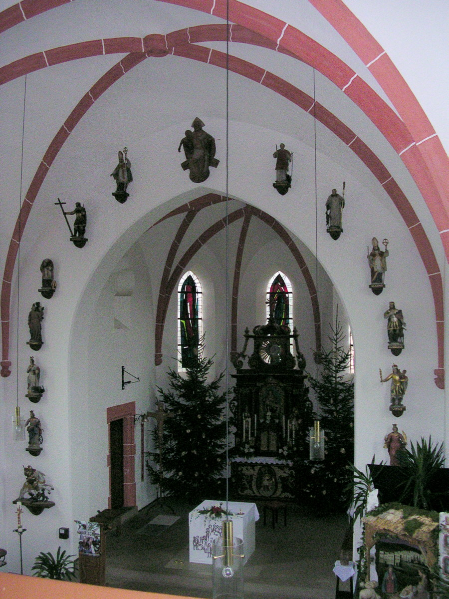 Daun-Rengen, rk. Filialkirche “St. Kunibert” - ehemalige Wallfahrtskapelle mit Holzfiguren der 14 Nothelfer (eine Statue ist durch die Krippe verdeckt) und Holzaltar von Anfang des 18. Jahrhunderts